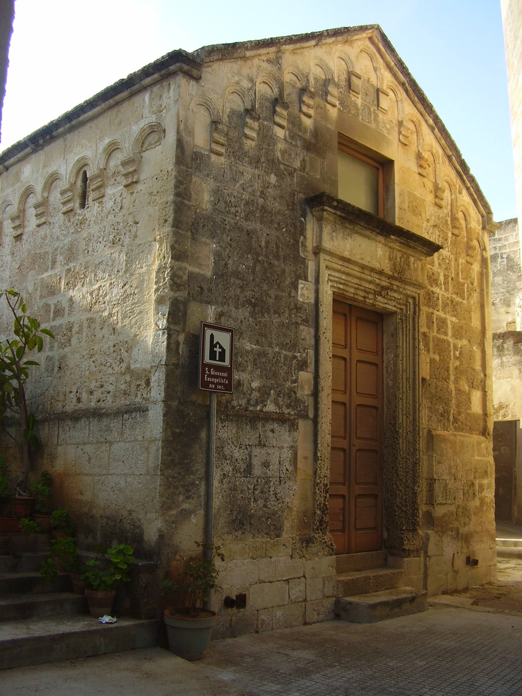 Chiesa San Giovanni Evangelista San Cesario di Lecce